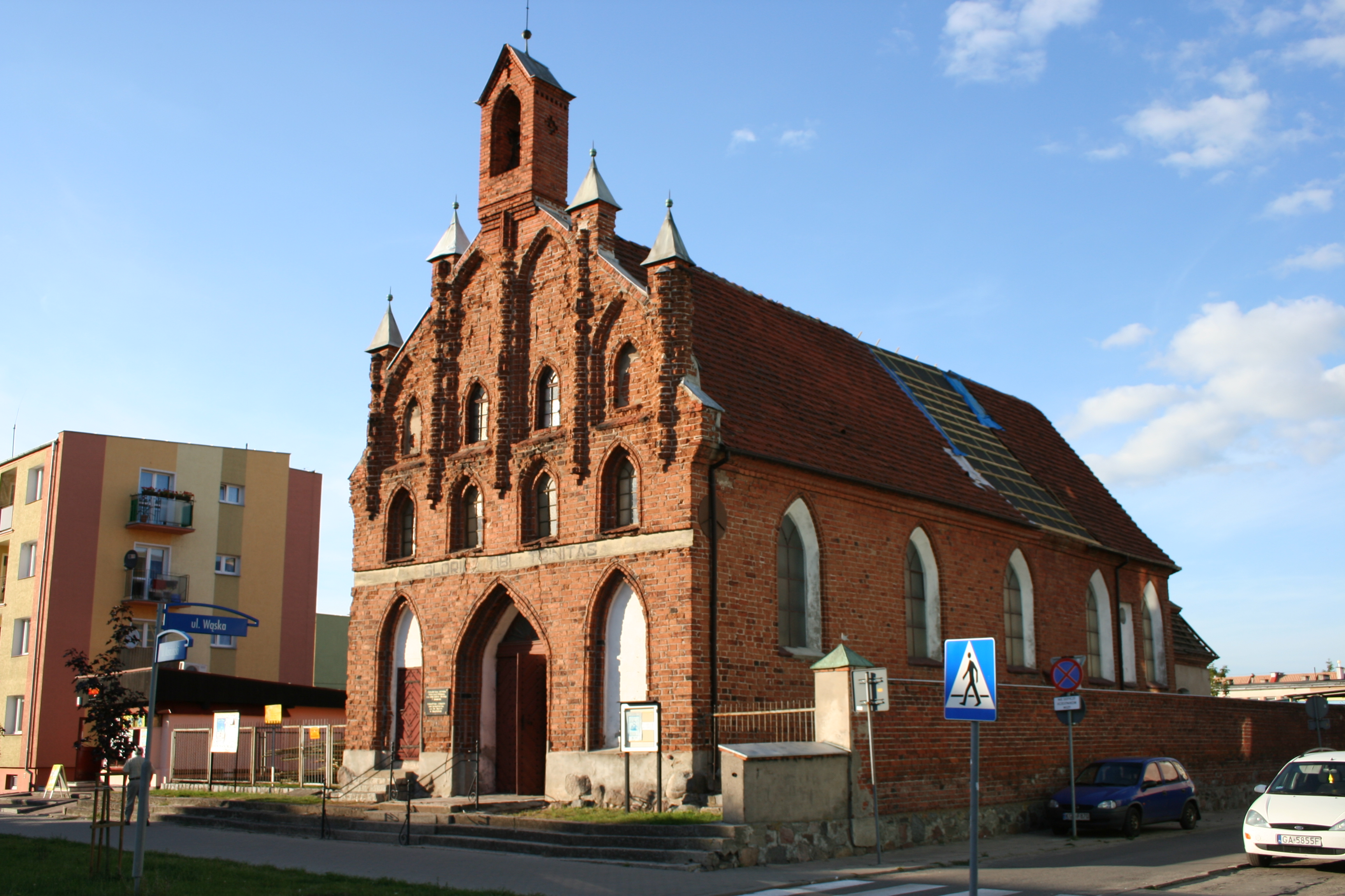 Braniewo, kościół par. p.w. Św. Trójcy, ob. gr.-kat., 1 poł. XV, 1583-1584, 1681, XVIII